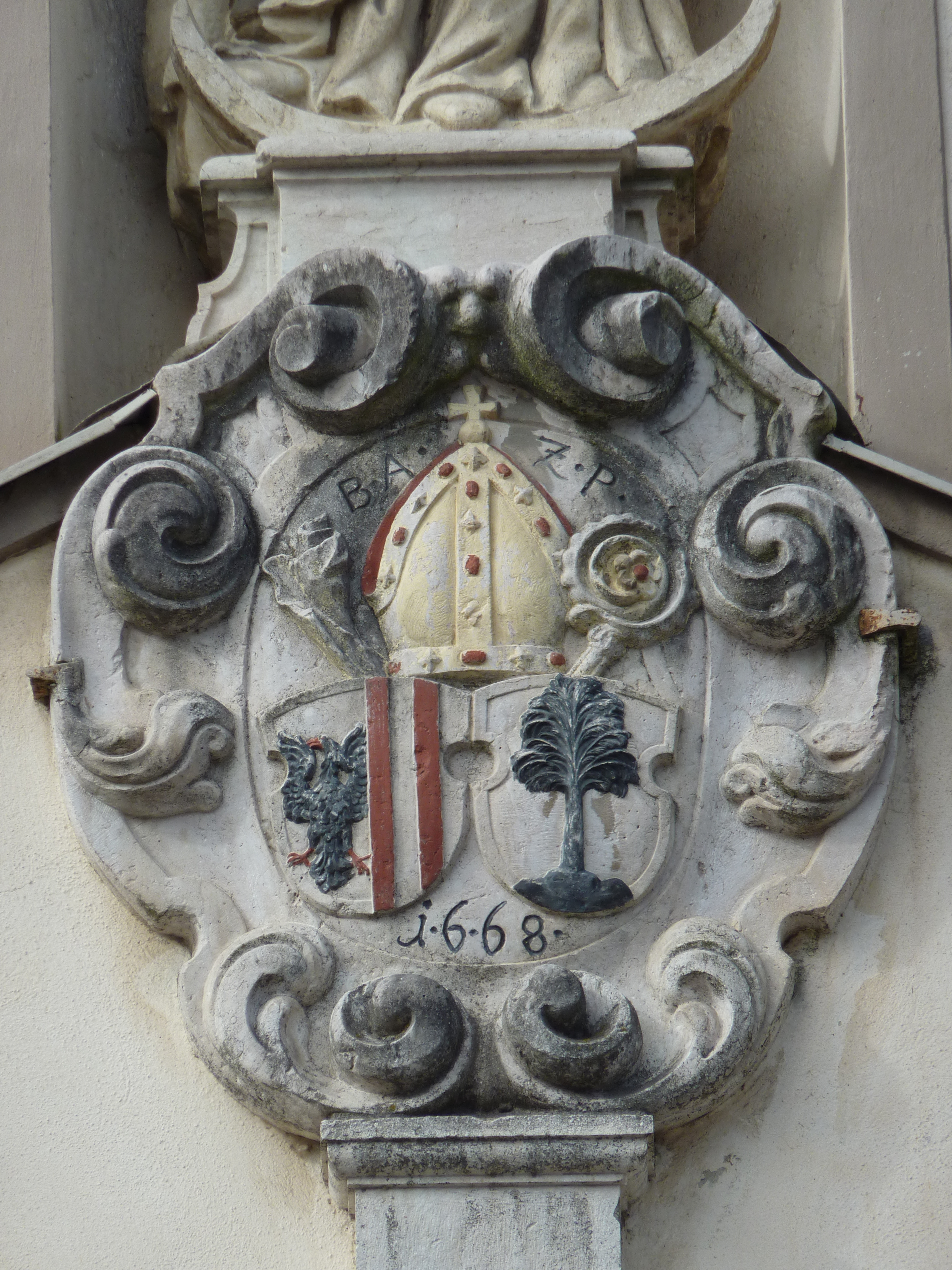 Stift Baumgartenberg, Oberösterreich - Ostportal mit Wappen von Abt Bernhard Breil